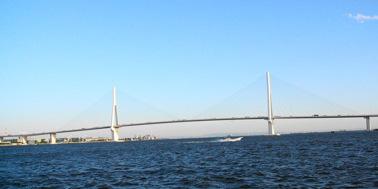 鶴見つばさ橋